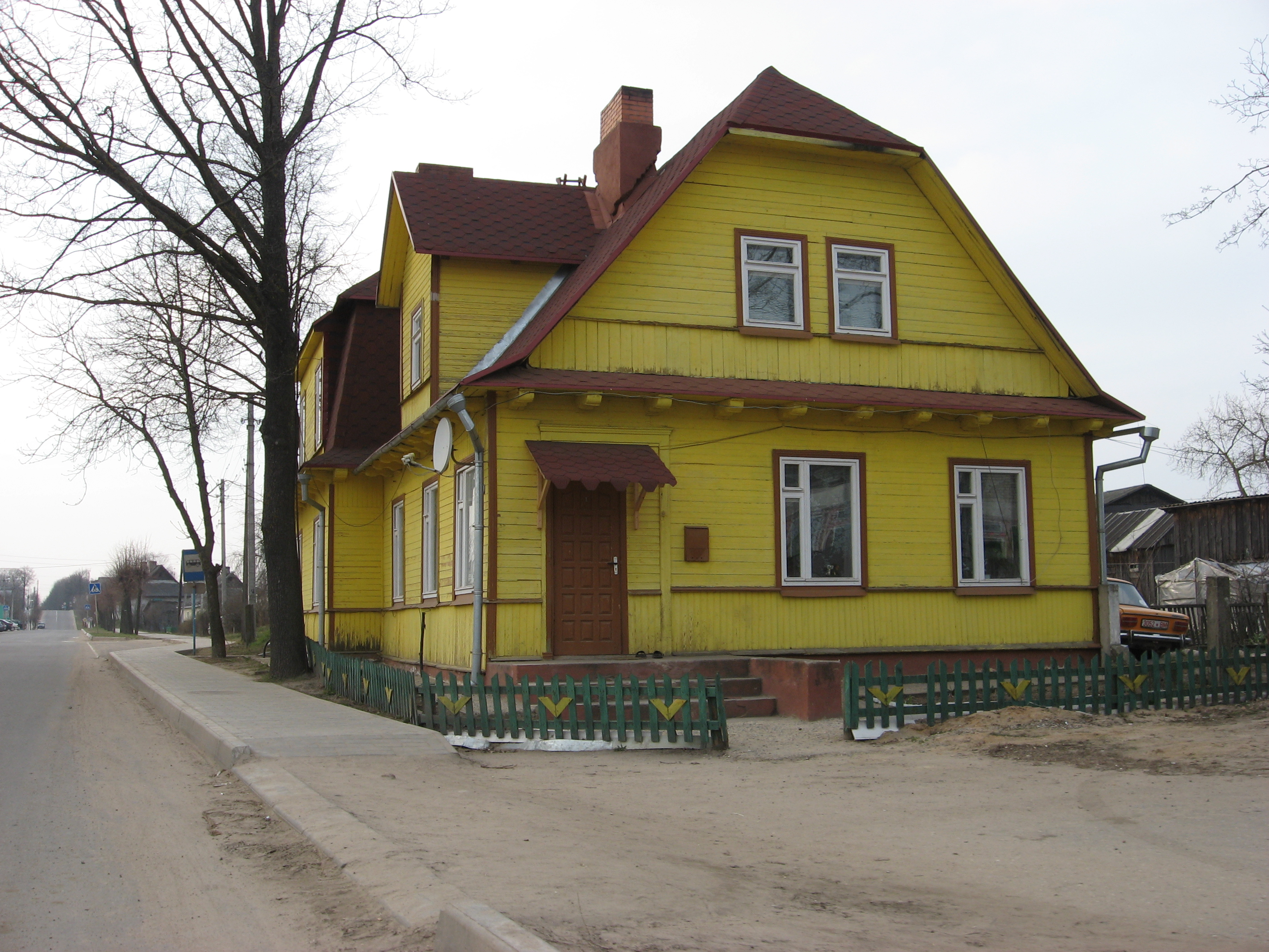 бывшее здание ж\д вокзала, ныне жилой дом